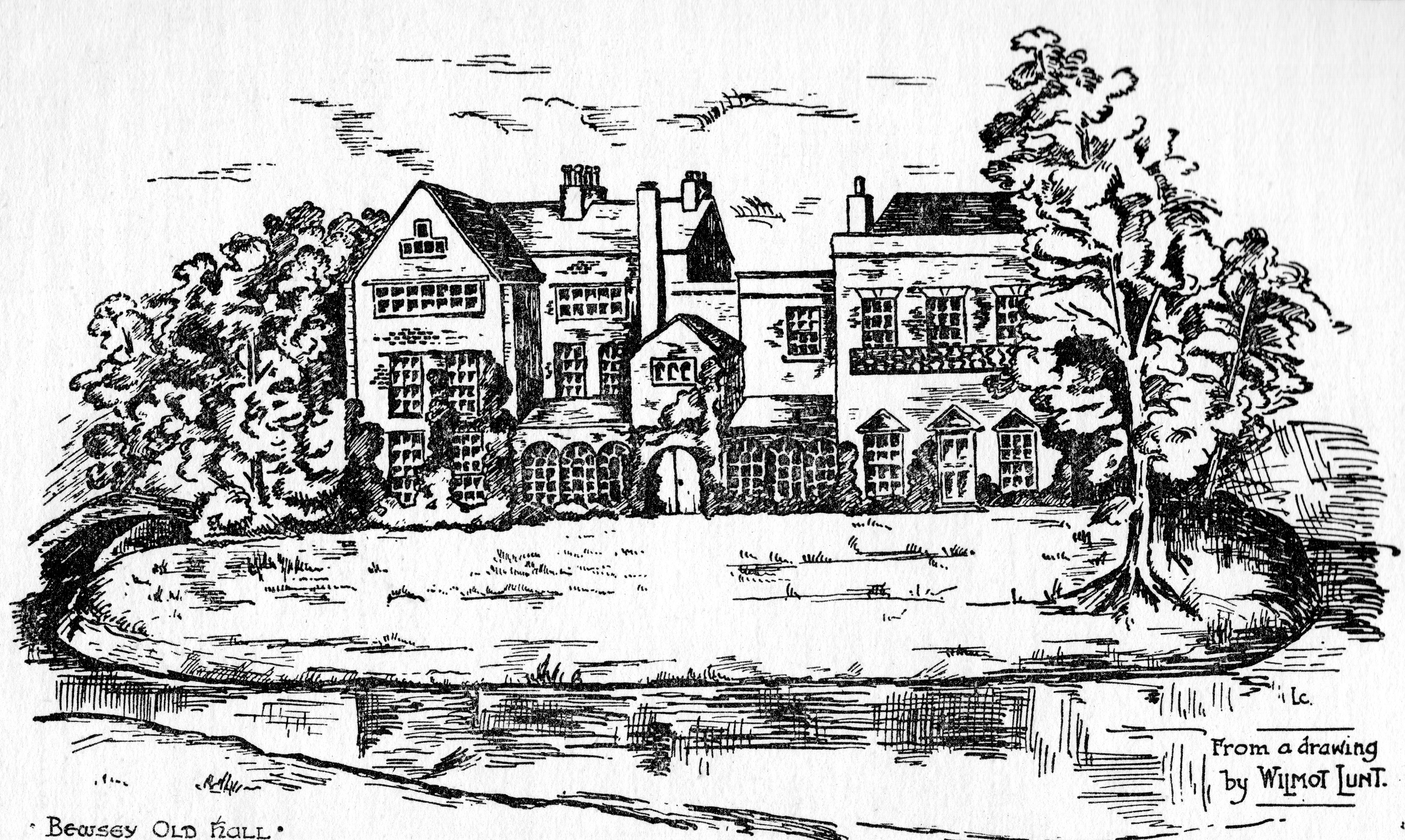 Bewsey Old Hall